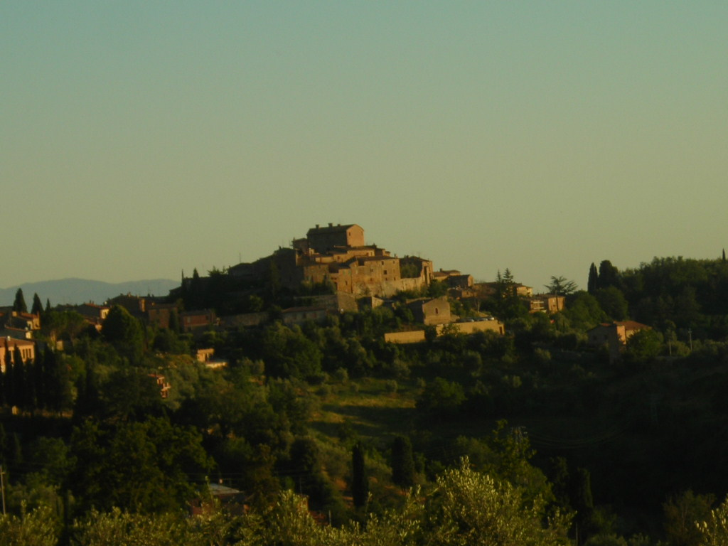 In questa fotografia, scattata il 14 luglio 2007, è stato immortalato dalla strada per Trequanda il paese di Montisi, in provincia di Siena, al tramonto.